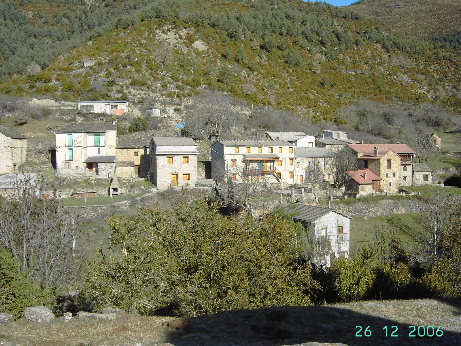 Plano general de las casas reformadas de Buesa, tal y como se ven desde la subida a la iglesia del pueblo.